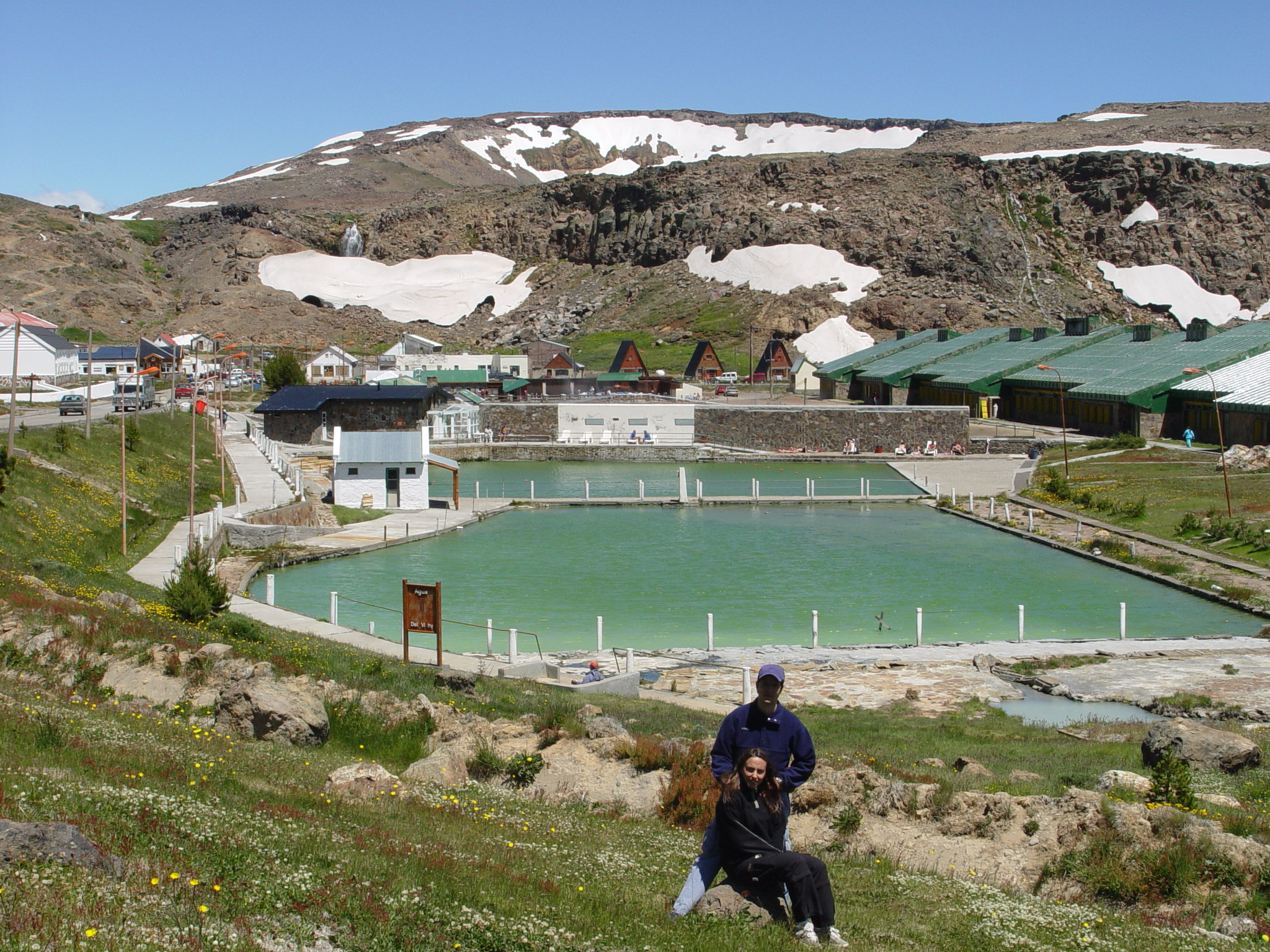 Imagen de Copahue donde se puede apreciar la laguna Verde al centro, a la derecha el complejo termal y una vista general de la terma.